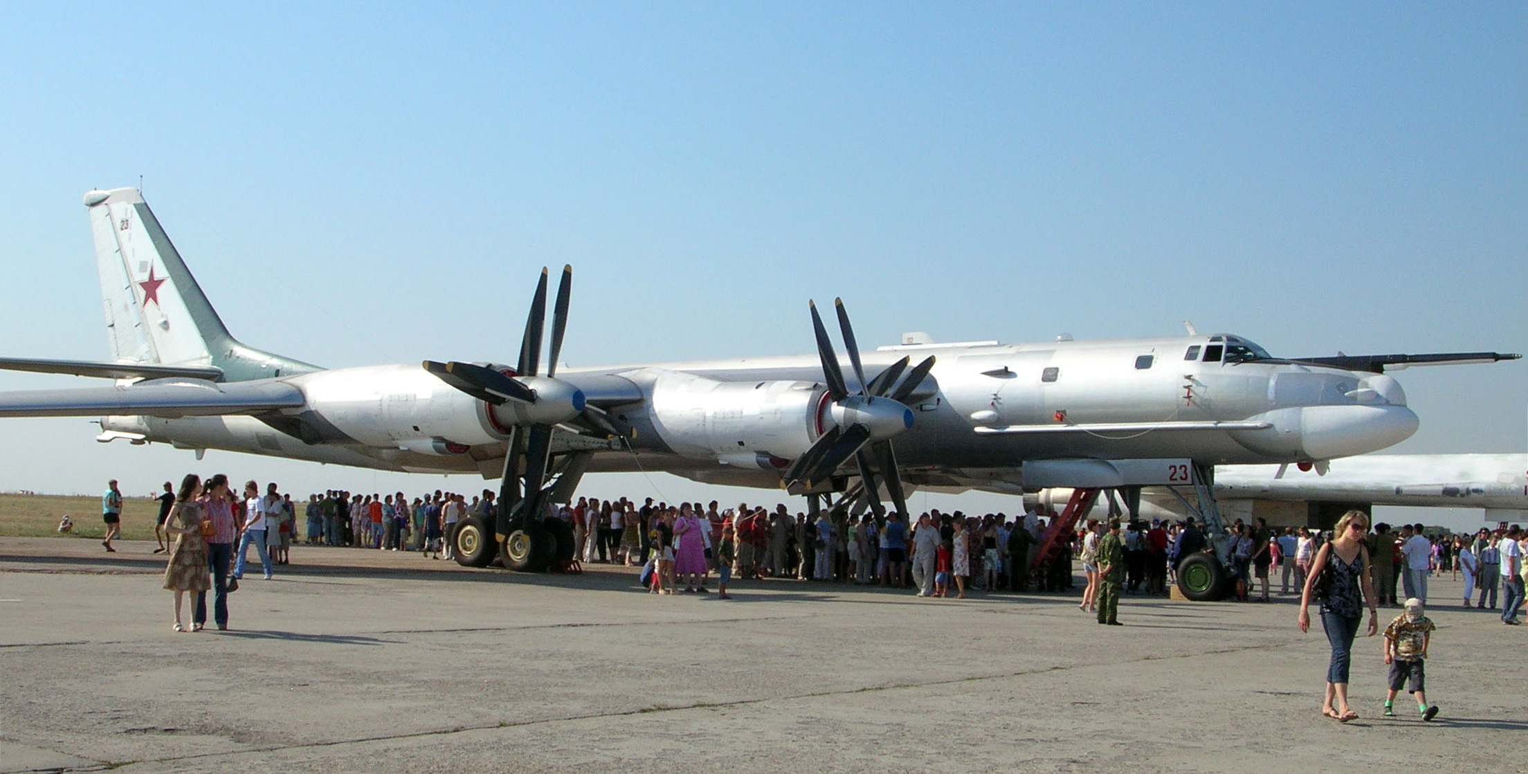 Стратегический ракетоносец Ту-95МС (б.н. 23) на авиабазе Энгельс.